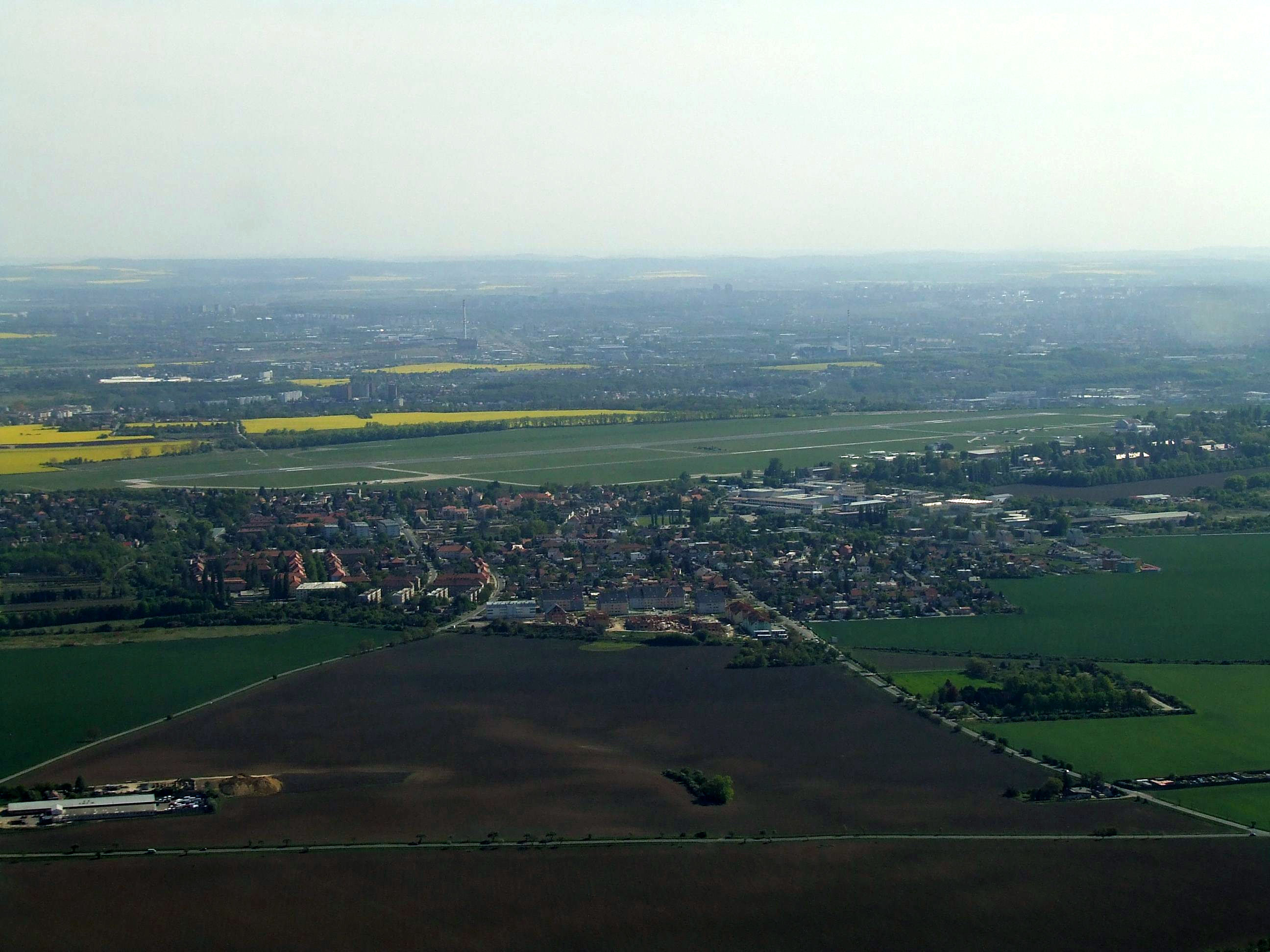 Městská část Praha - Kbely